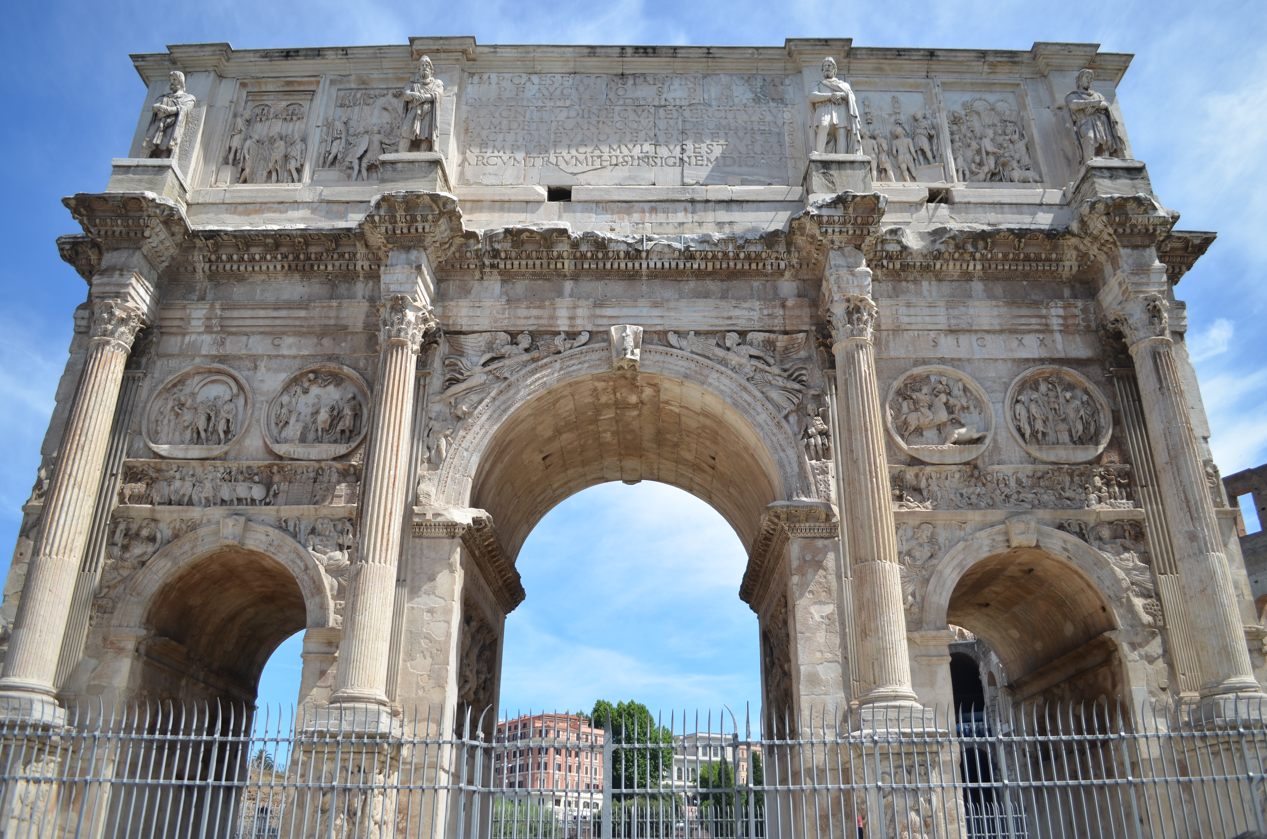 Colosseum